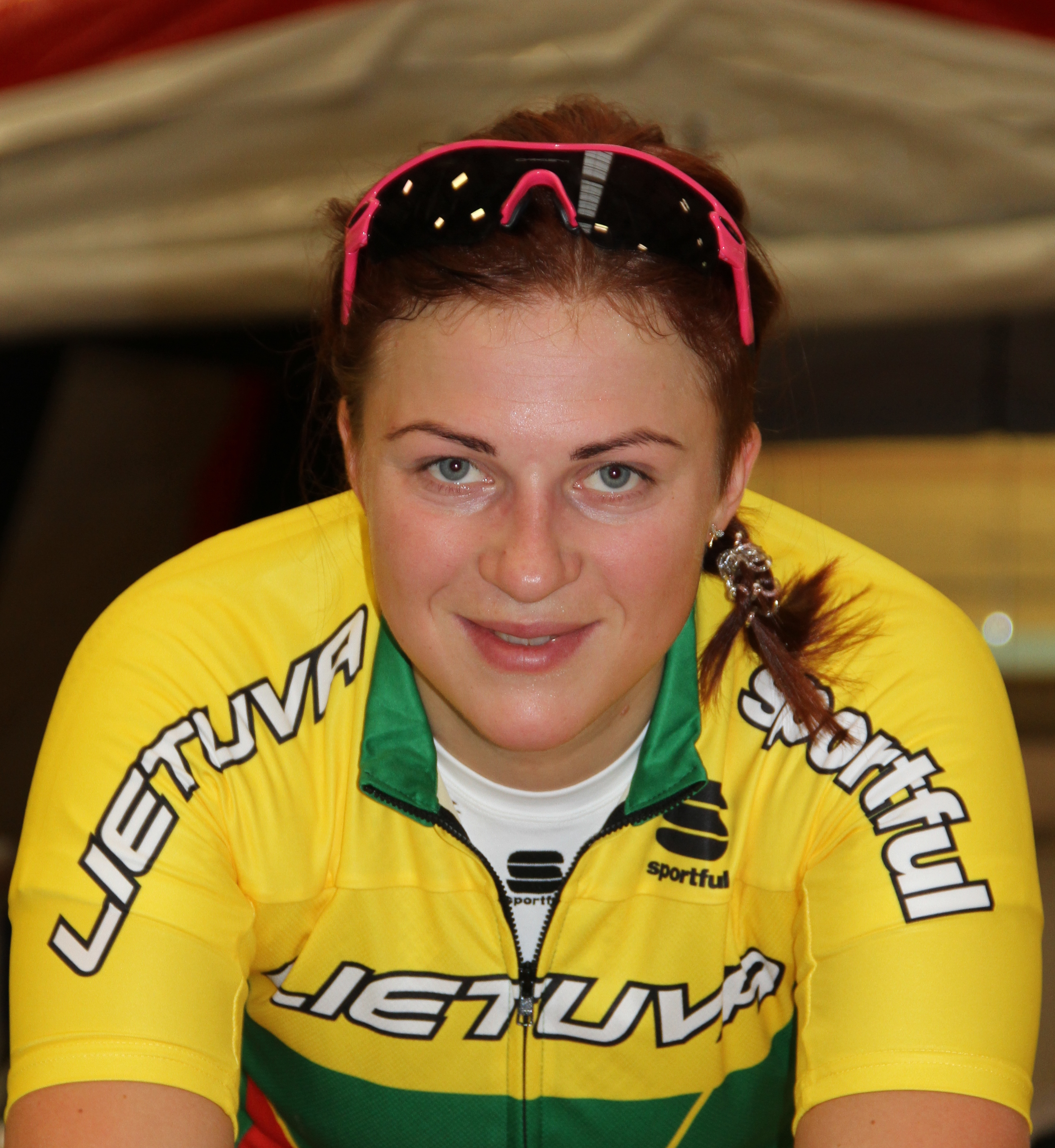 Vaida Pikauskaite, litauische Radsportlerin The making of this document was supported by the Community-Budget of Wikimedia Germany.